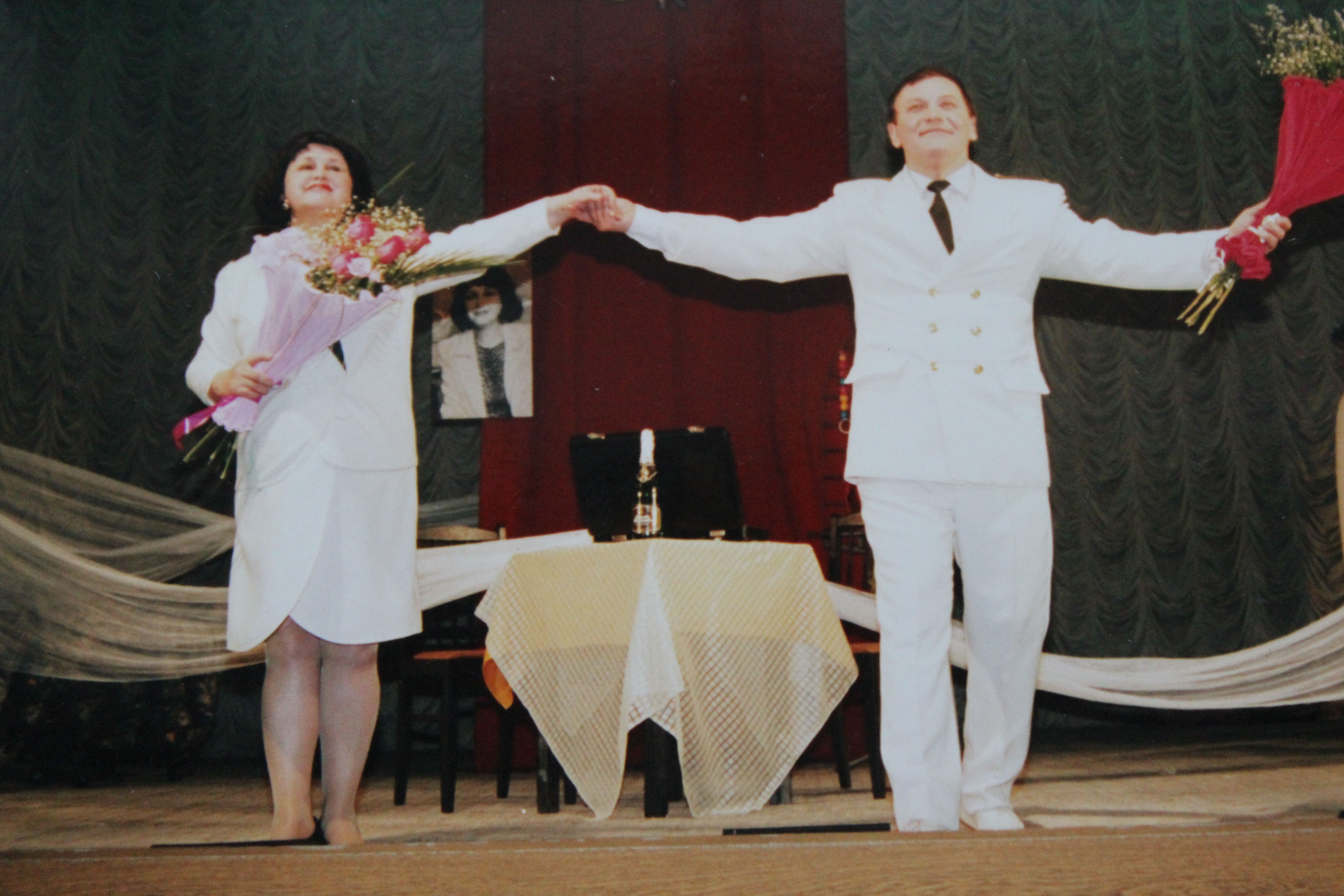 Сцена из спектакля «Идеальная пара» Санкт-Петербургского драматического театра «Патриот» РОСТО. В роли Марианны Татьяна Кудрявцева, в роли Игоря Геннадий Егоров. Режиссёр-постановщик Геннадий Егоров.